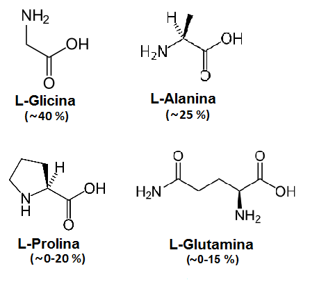 Aminoácidos más abundantes en las sedas de araña corrientes.